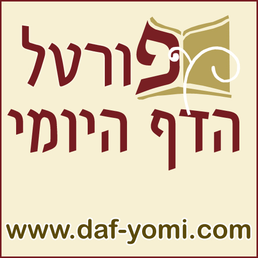 לוגו האתר